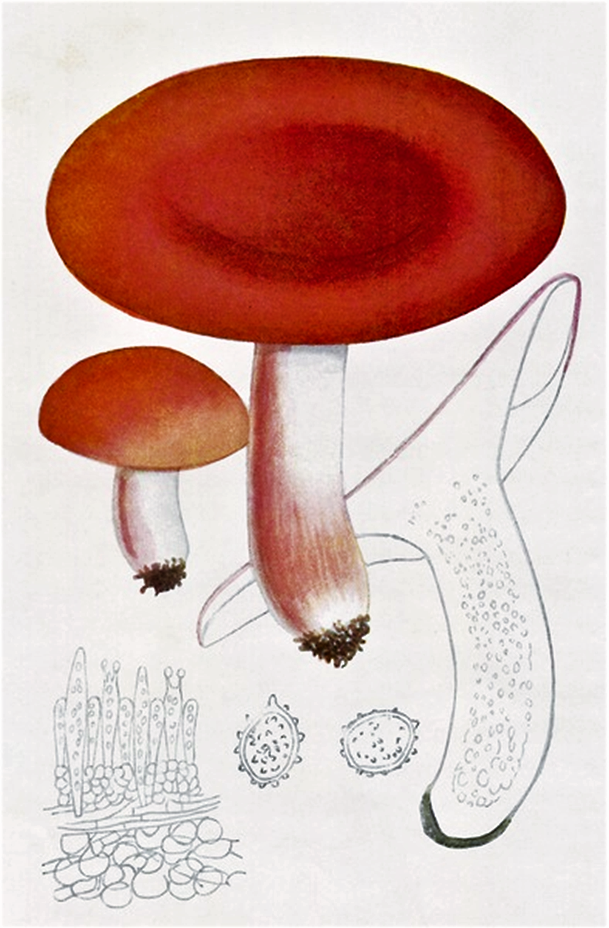 Giacomo Bresadola: Russula lepida Elias Magnus Fries, 1836), heute Russula rosea Pers. (1796)